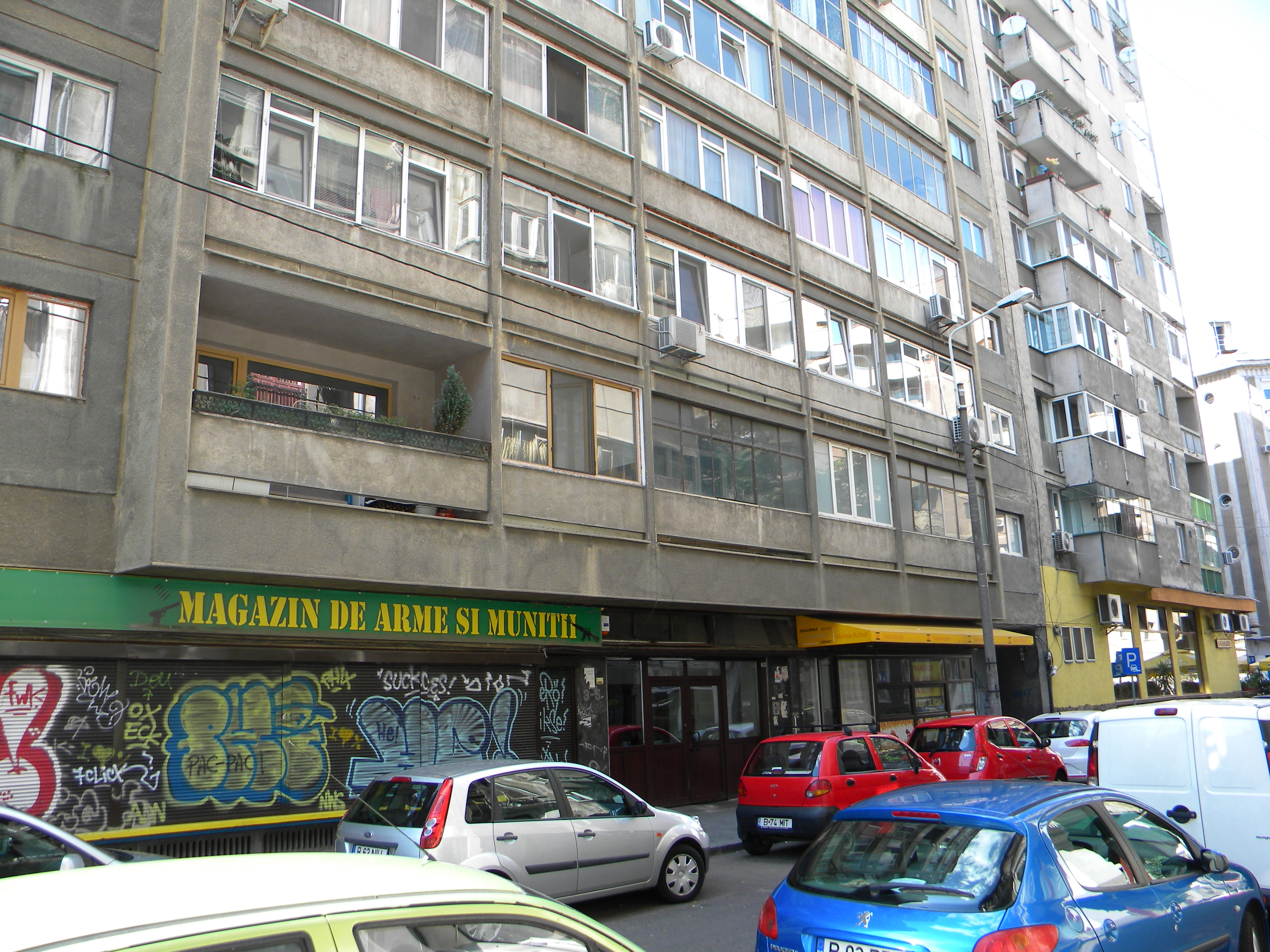 Imobil pe strada Ion Brezoianu nr. 3-5, Bucuresti sect. 1